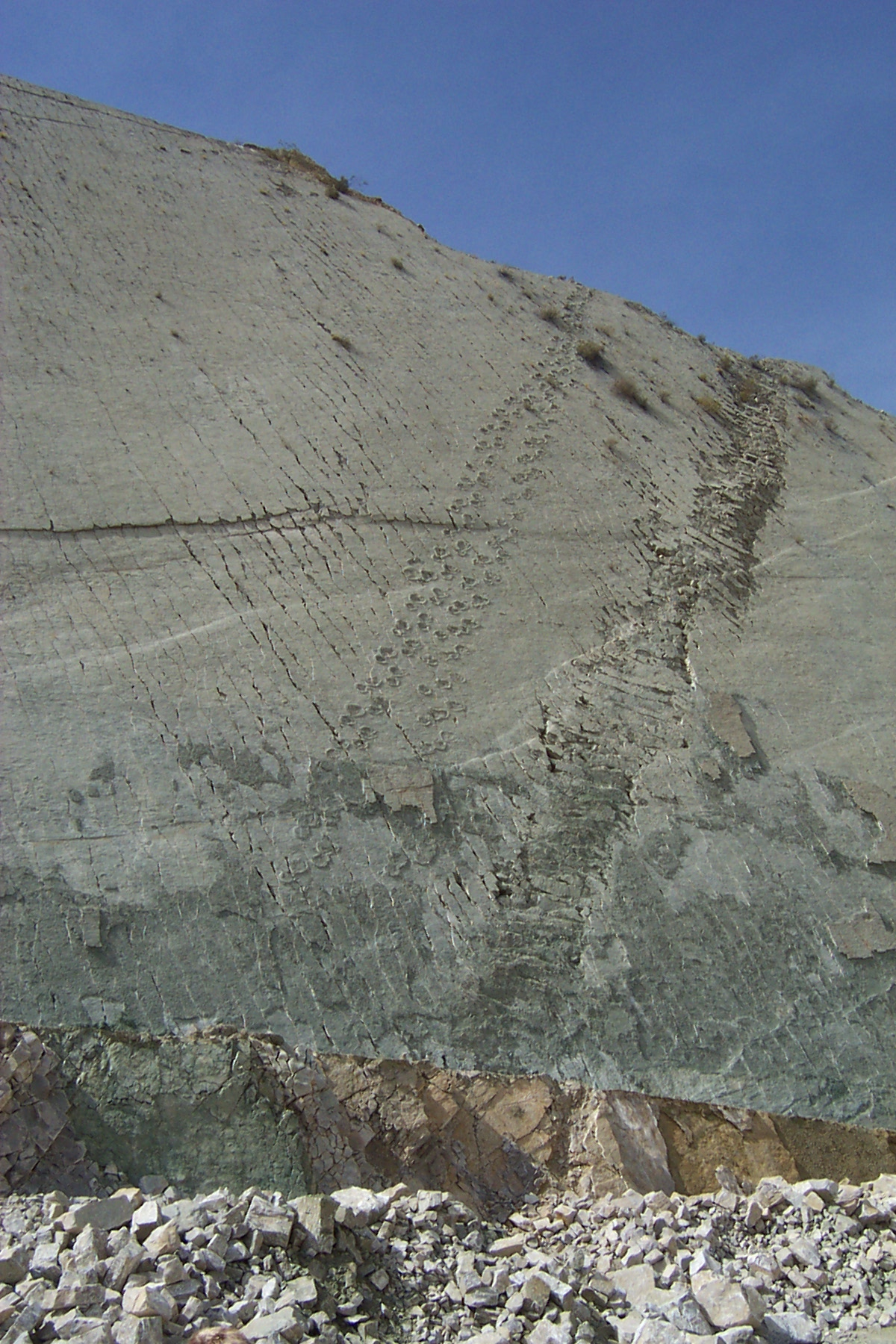 Eigen foto. Krijtwand met dinosuarussporen bij Sucre (Bolivia) zomer 2002